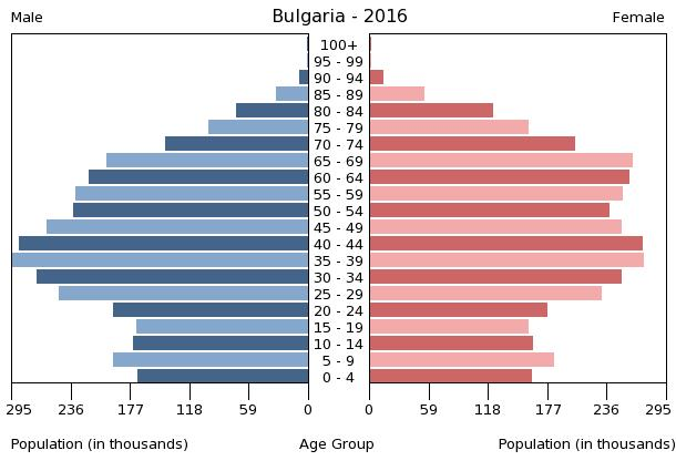 A population pyramid illustrates the age and sex structure of a country's population and may provide insights about political and social stability, as well as economic development. The population is distributed along the horizontal axis, with males shown on the left and females on the right. The male and female populations are broken down into 5-year age groups represented as horizontal bars along the vertical axis, with the youngest age groups at the bottom and the oldest at the top. The shape of the population pyramid gradually evolves over time based on fertility, mortality, and international migration trends.